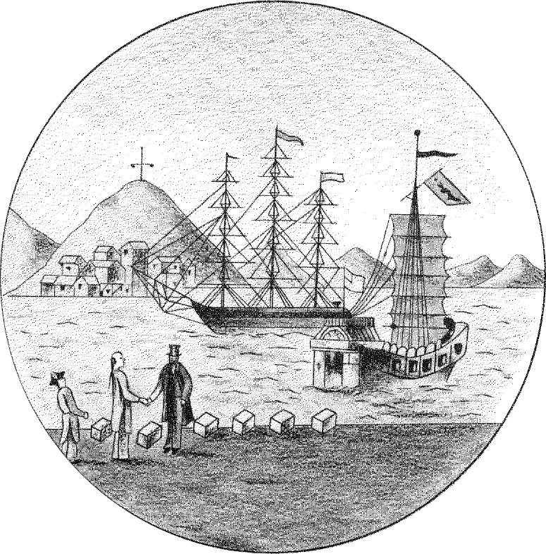 阿群帶路圖初稿